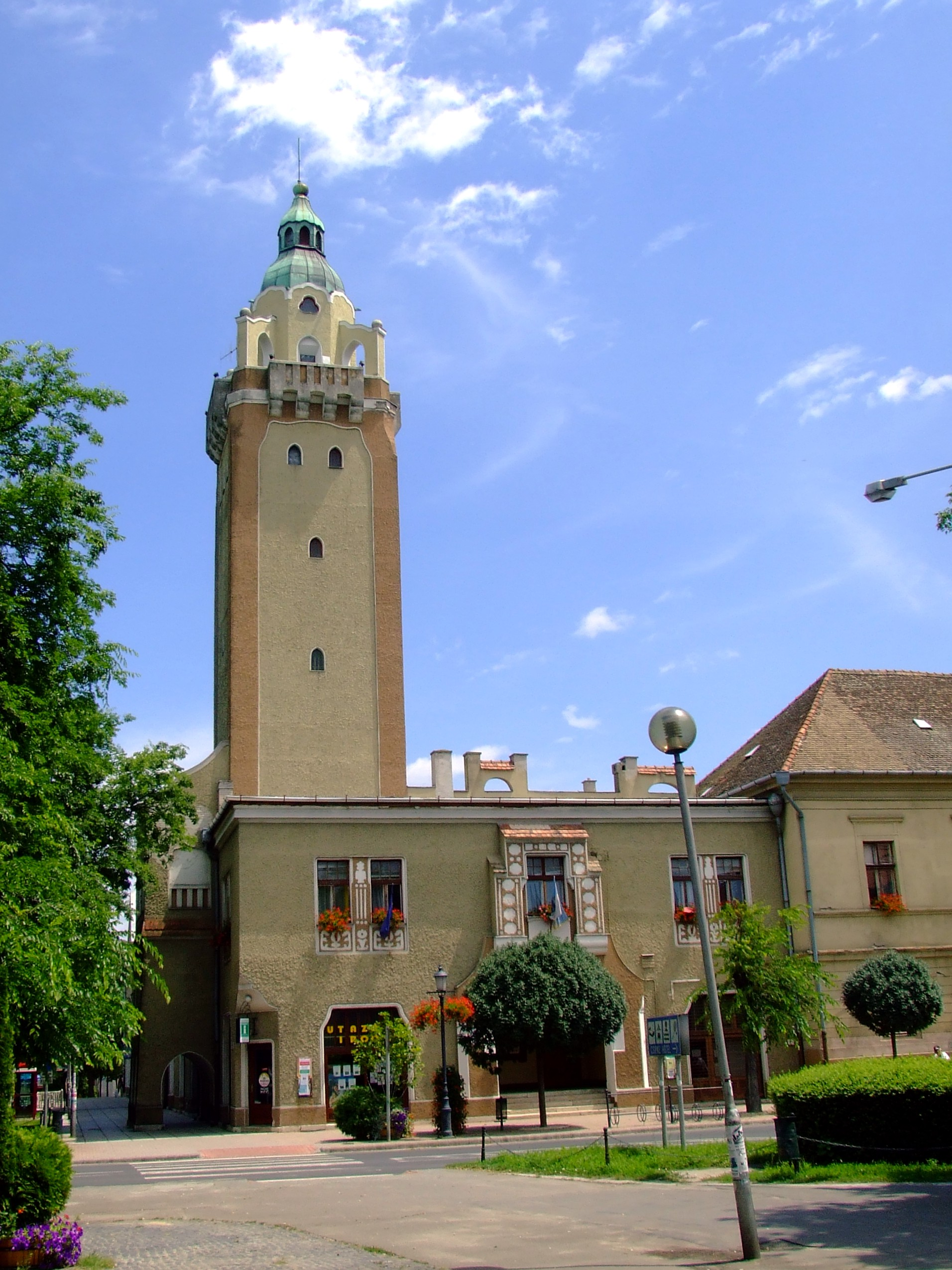 A kiskunhalasi városháza. Épült 1833–34-ben Fischer Ágoston tervei szerint. 1906-ban Hikisch Rezső és Kotál Henrik tervei szerint bővítették